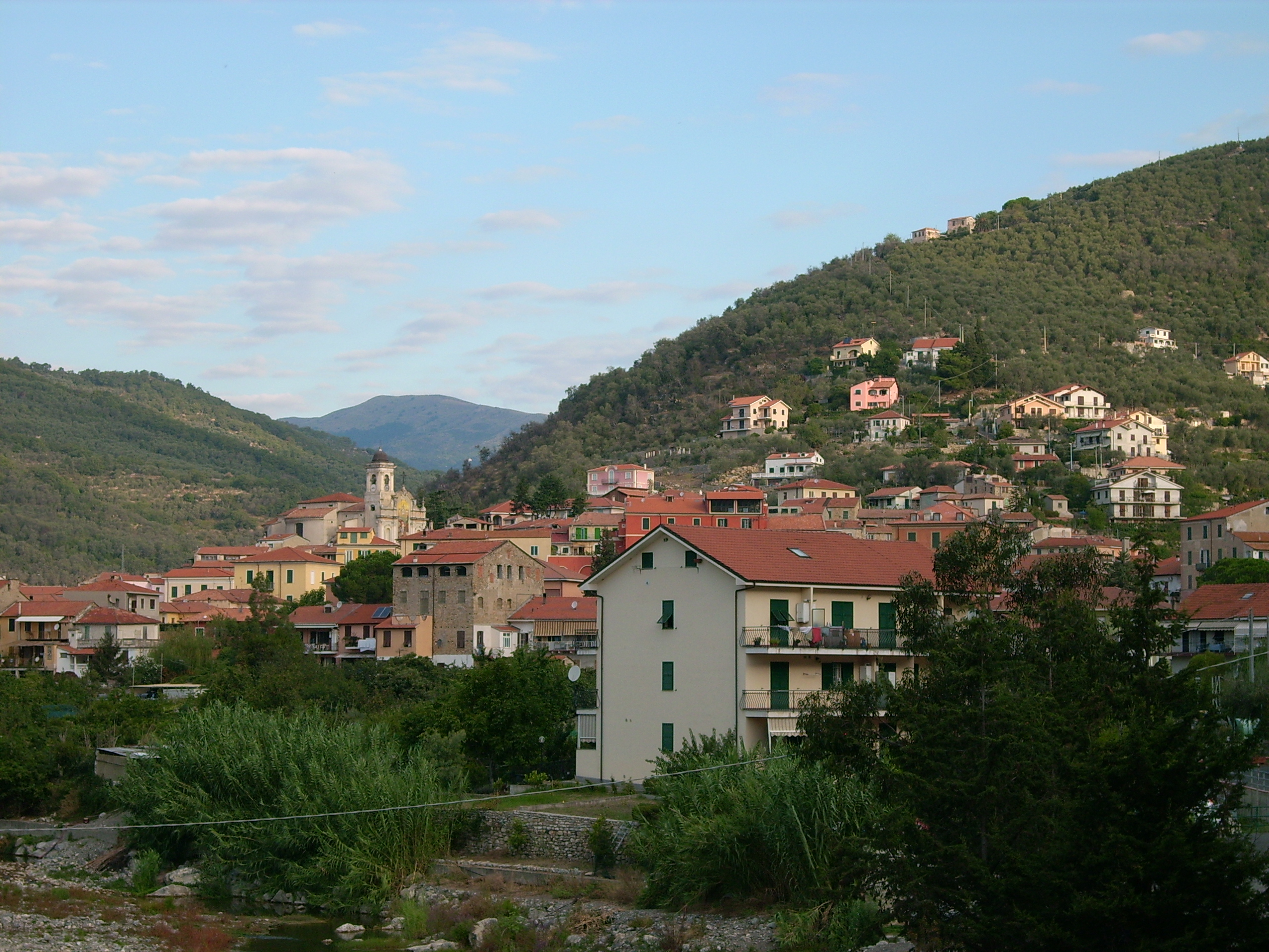 Pontedassio, Liguria, Italia